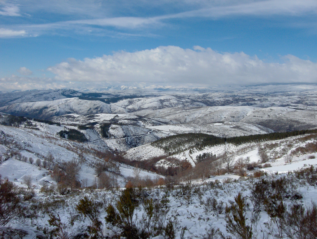 Algures no concelho de Vinhais - Portugal